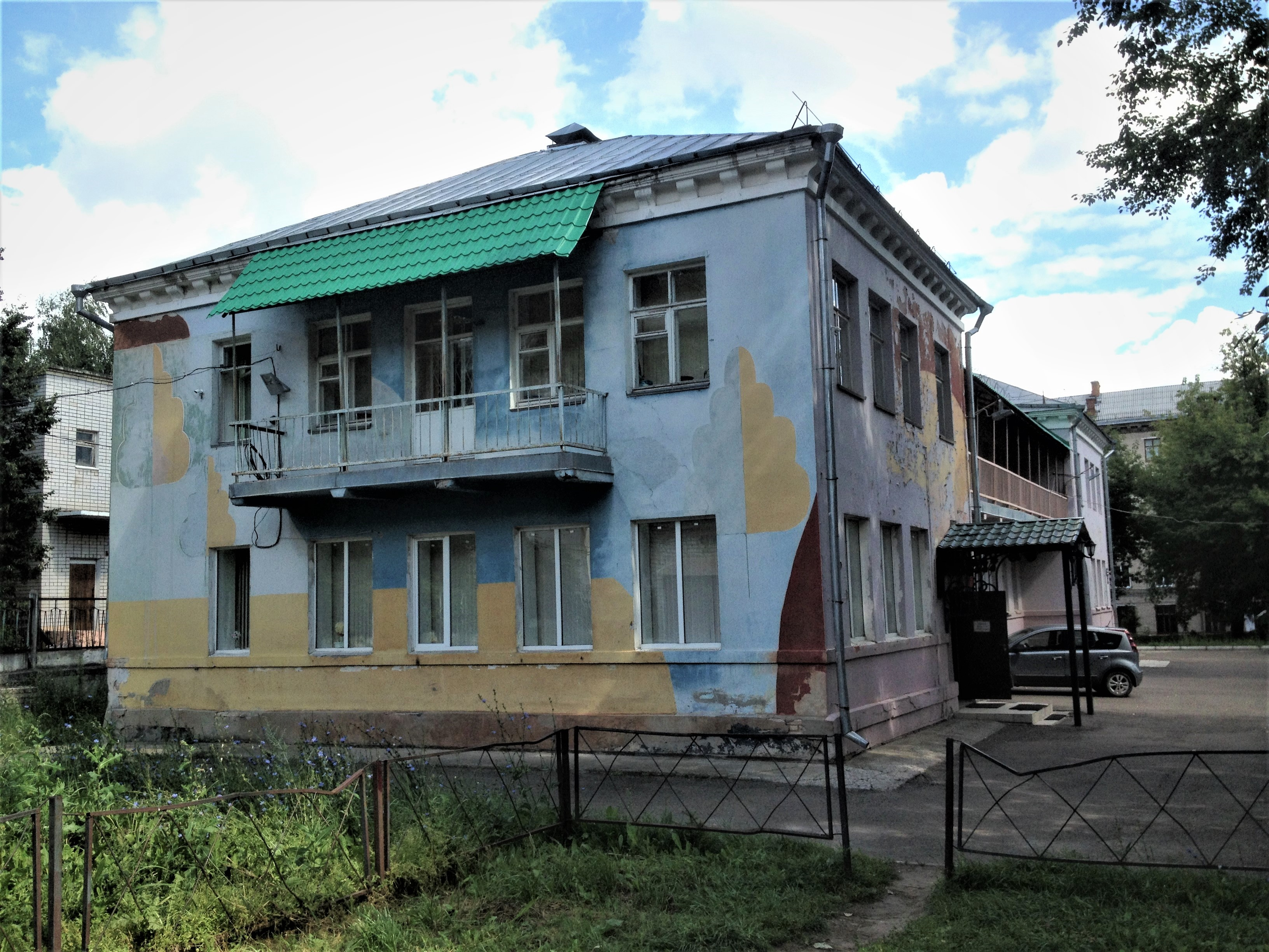 ГБУДО «Республиканский центр внешкольной работы» (г. Казань, ул. Тимирязева, д. 8 А).